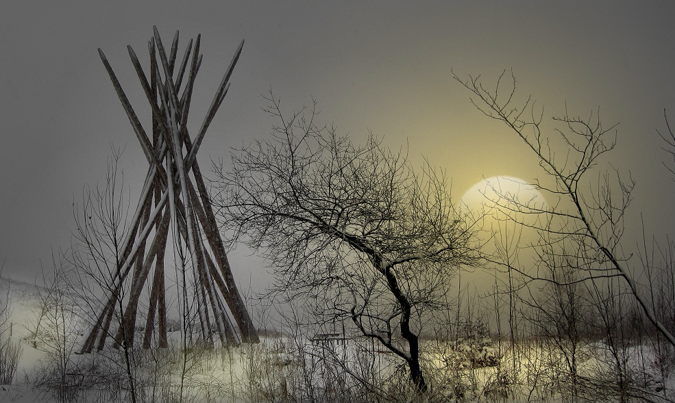 „Kyrill-Tor“ am Ortseingang von Petersborn (Brilon, NRW, Deutschland), anlässlich des verheerenden Sturmes Kyrill als Mahnmal aufgestellt